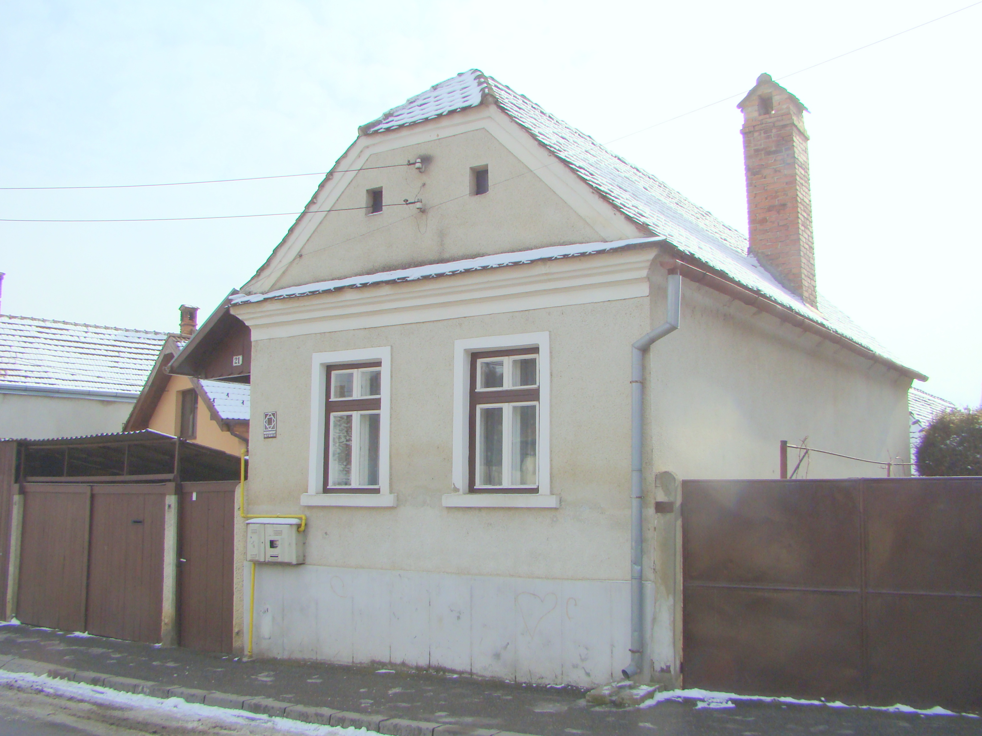 Casă, municipiul Sighișoara, str. Ștefan cel Mare 21 sec. XIX